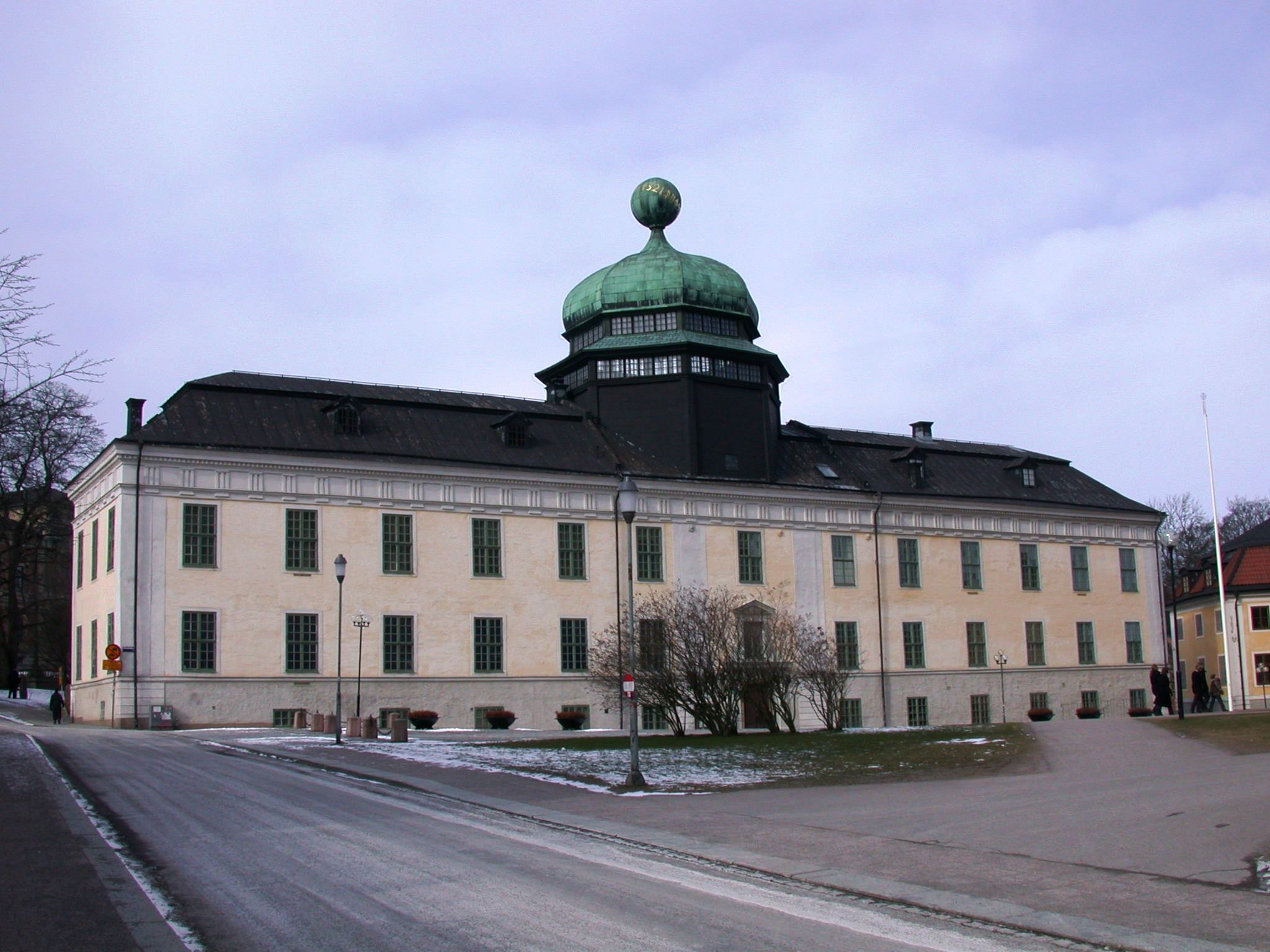 Gustavianum, Uppsala, Sweden